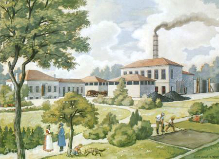 Als das Münchener Deutsche Museum dem Direktor der hannoverschen Gaswerke (heute: Stadtwerke Hannover), Leonhard Körting, einen professionellen Maler schicken wollte, um nach möglichst realistischen Vorlagen ein Gemälde von den Anfängen der Gaswerke an der Glocksee malen zu lassen, erwies sich die von Körting selbst gefertigte Vorlage als so präzise, dass die Museumsleitung den Direktor nun um ein von ihm selbst gemaltes Gemälde bat. So enstand Körtings originales Ölgemälde auf Leinwand für das Deutsche Museum, in den Maßen 72 x 100 cm, rechts unten signiert „I. Körting 1922, in obigem Wohnhause geboren 1834“ ...